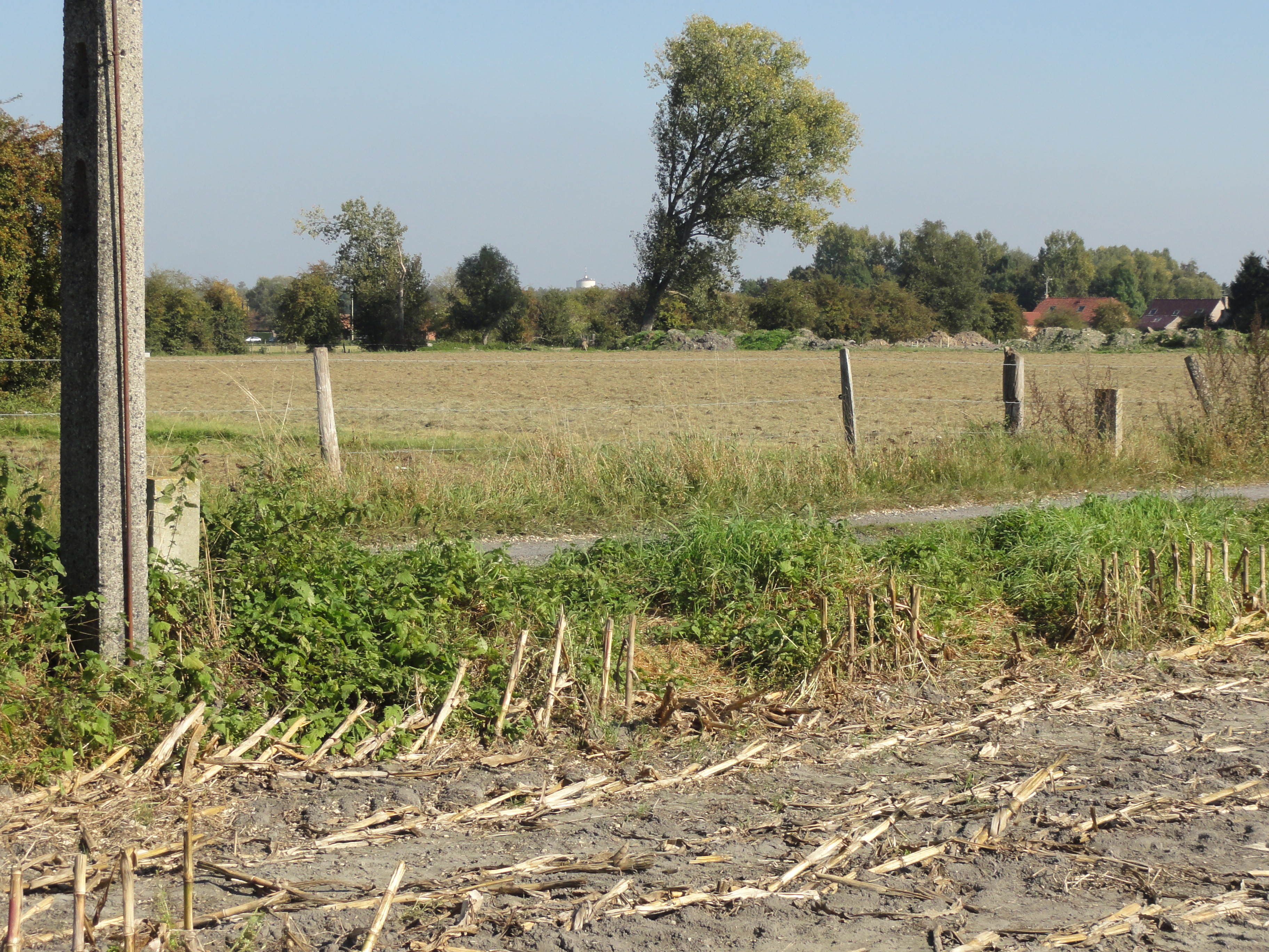 Les avaleresses Peau de Loup de la Société Desandrouin-Taffin, future Compagnie des mines d'Anzin, sont deux puits non exploités situés à Odomez, Nord, Nord-Pas-de-Calais, France.